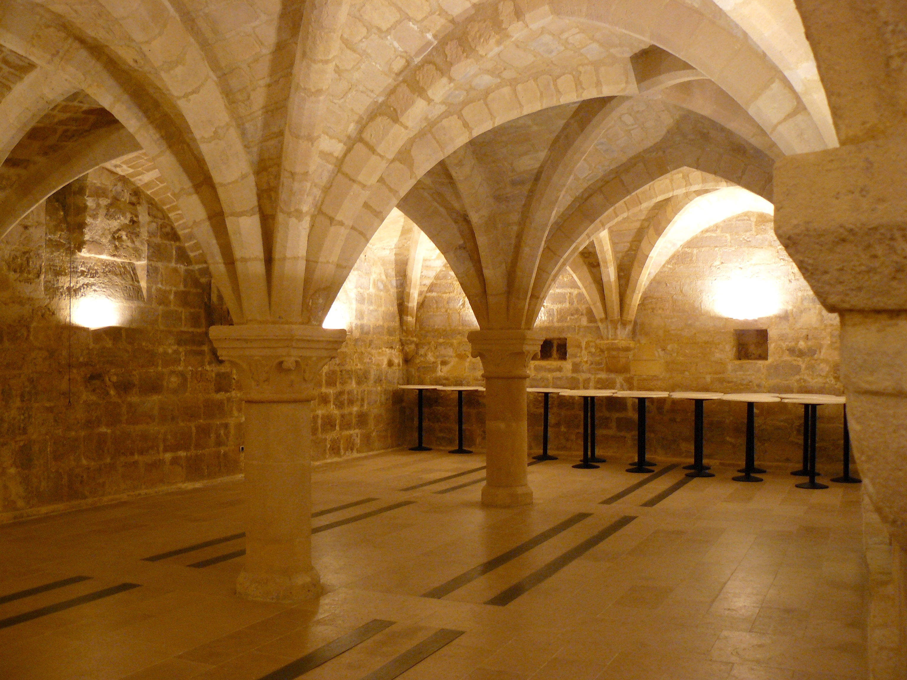 Cellier du XIIe siècle (cistercien) sous l'hôtel de Beauvais (68, rue François-Miron, Paris, 4e arrondissement)